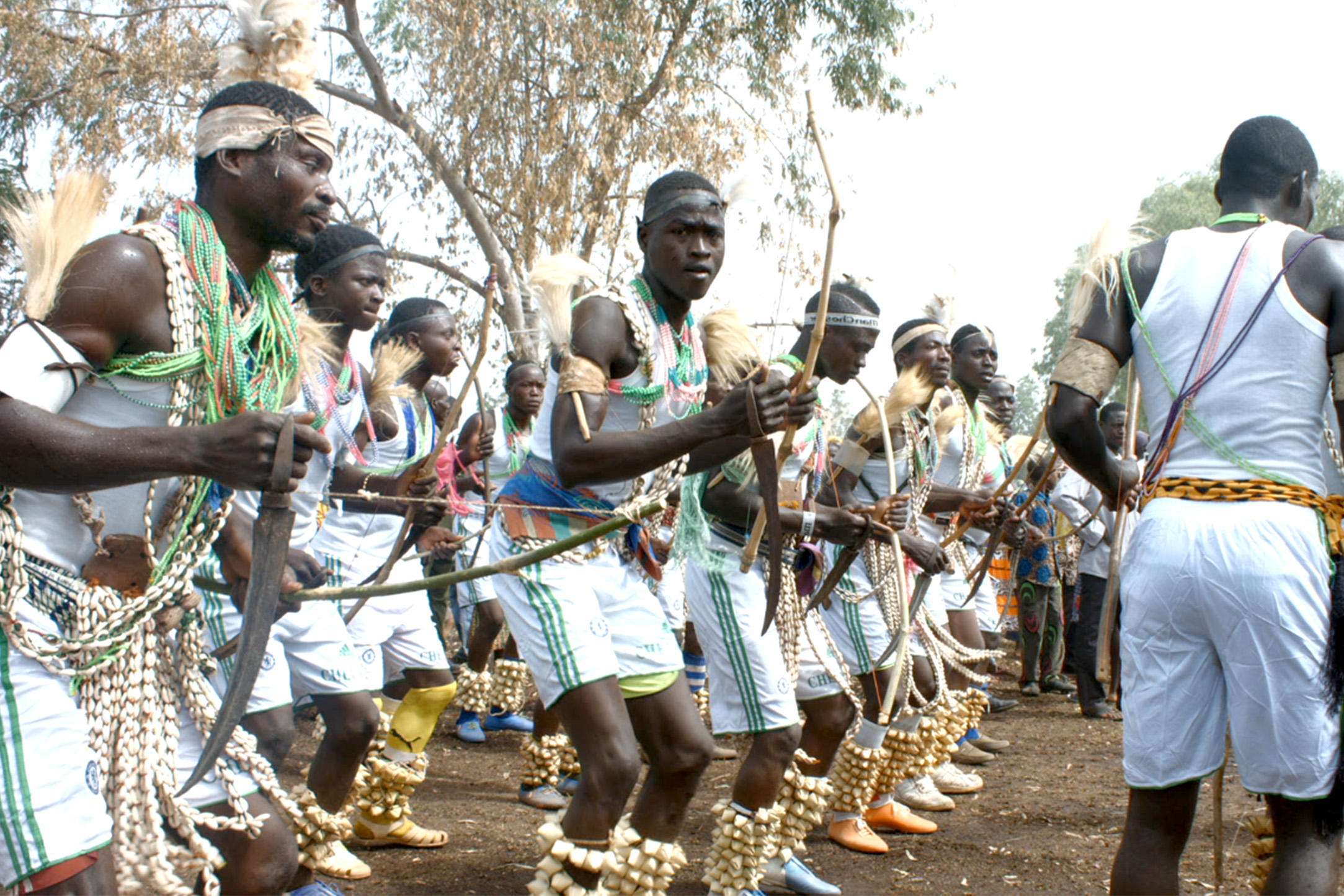 Fête traditionnelle-habye This is an image from Togo